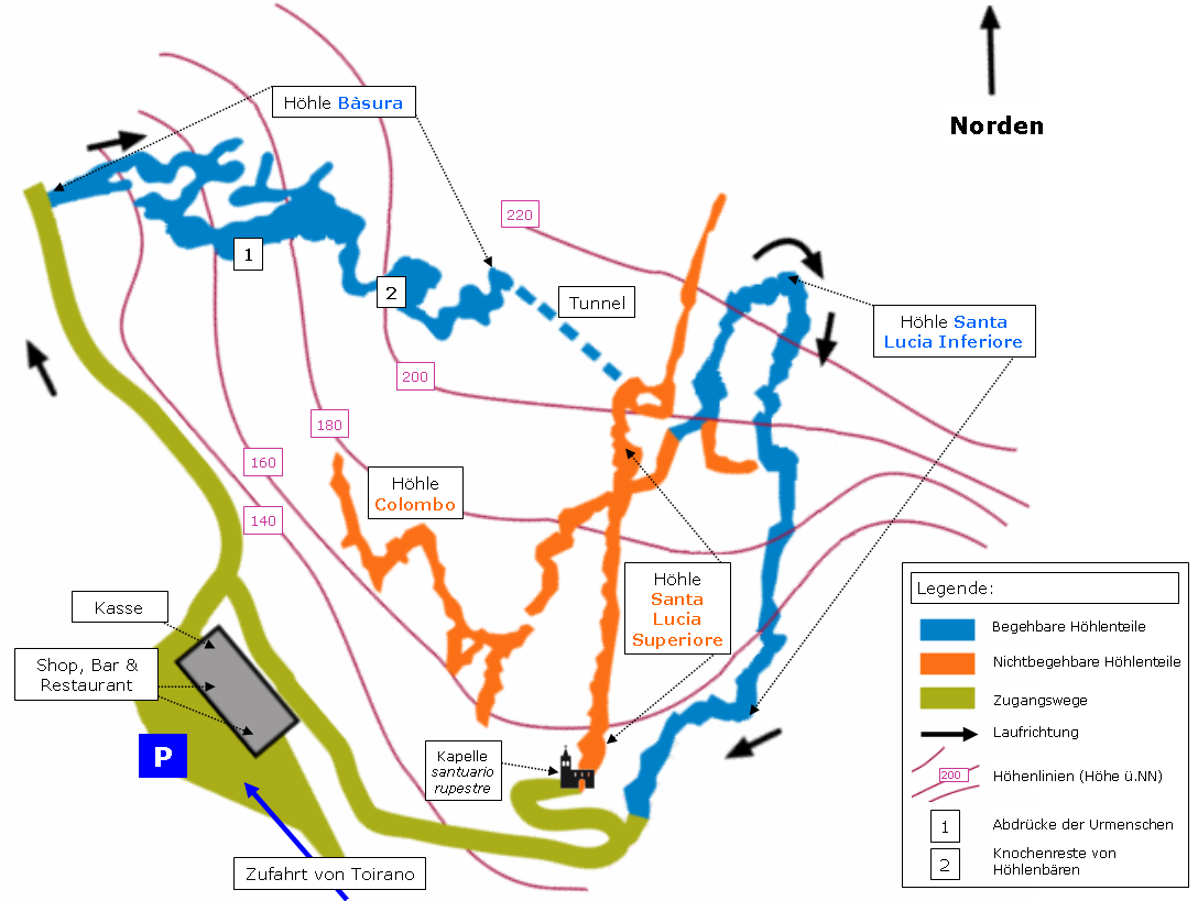 Schema der Begehung der Toirano-Höhlen